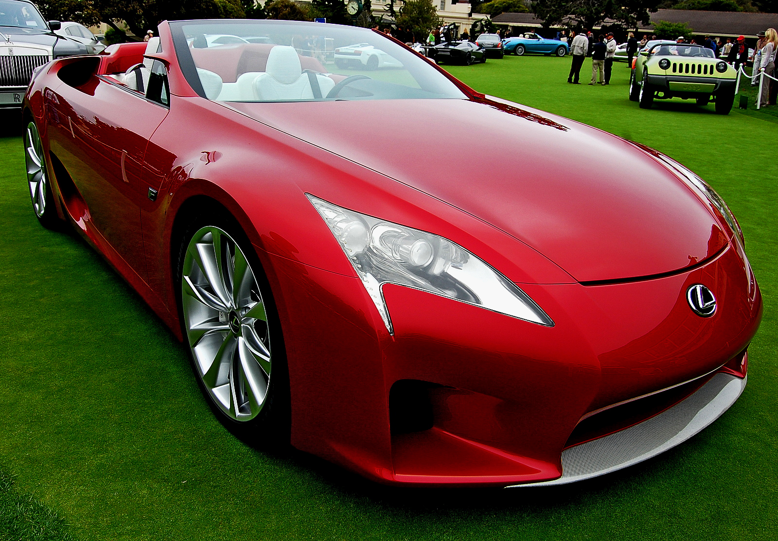 Lexus LF-A